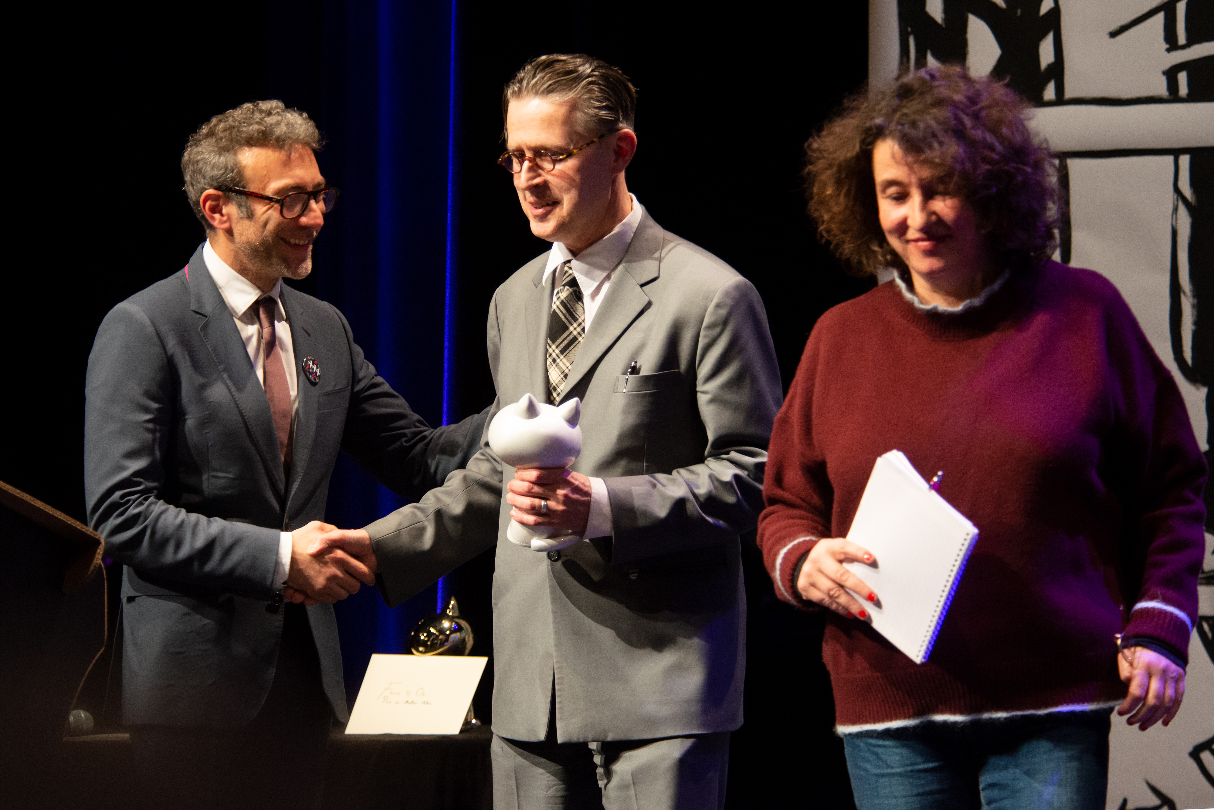 Cérémonie des Fauves, Festival International de la Bande Dessinée d'Angoulême 2020.